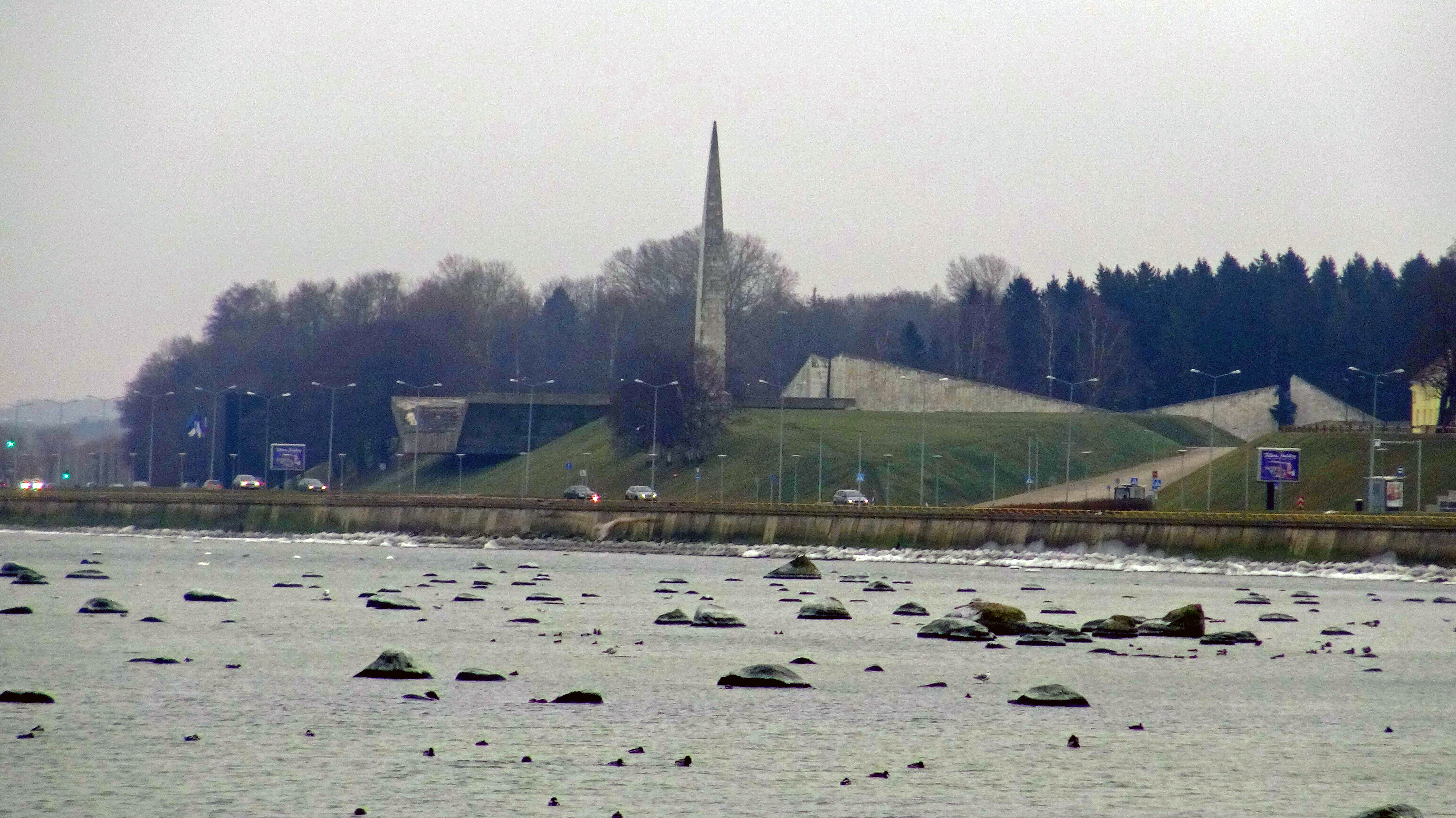 Мемориальный комплекс Маарьямяги, вид с моря. Слева направо: Мемориал жертвам коммунизма, Площадь Примирения, обелиск, "Негаснущее пламя", "Гибнущие чайки"